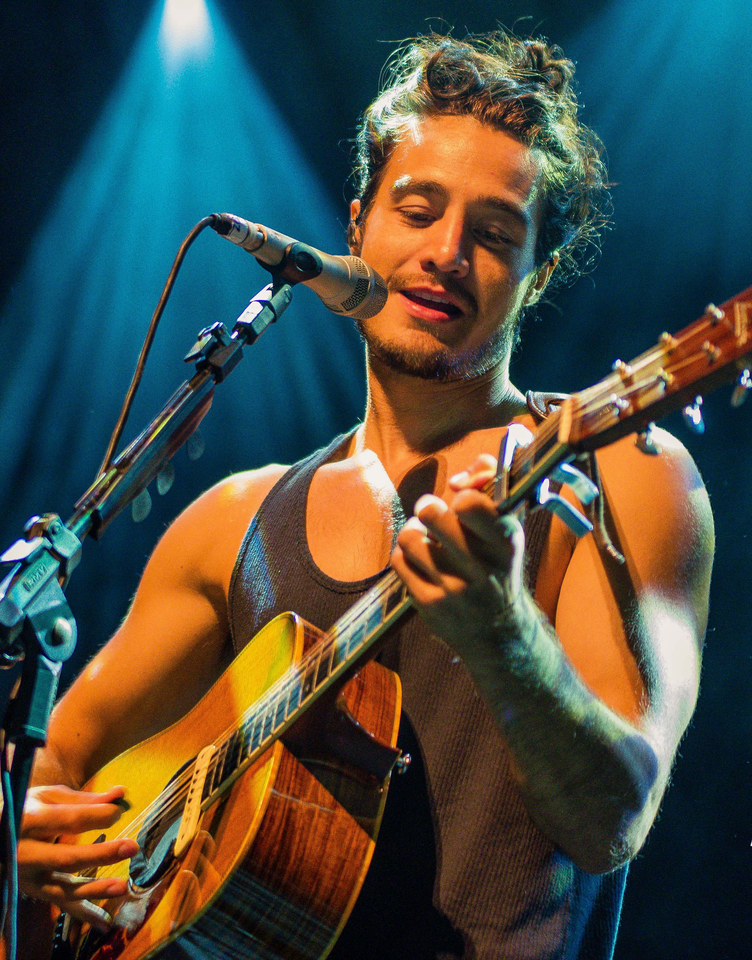 Tiago Iorc 2017